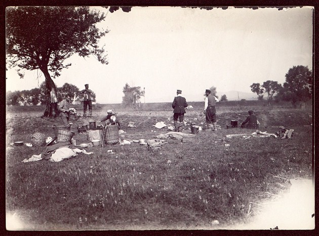 Български войници край Долни Порой по време на Балканската война, 1913 година